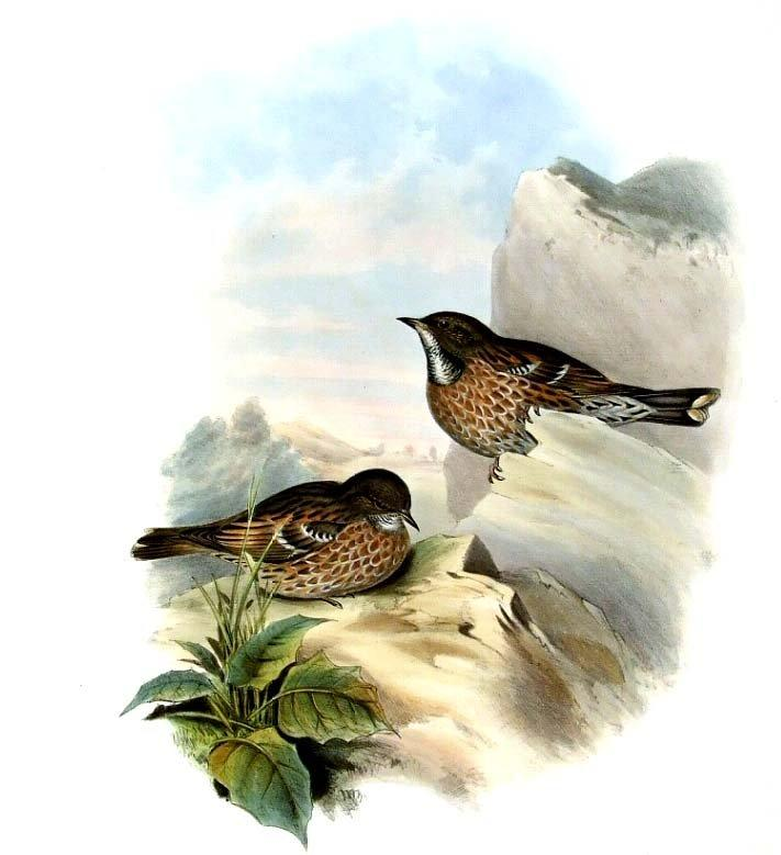 Accenteur de l'Himalaya